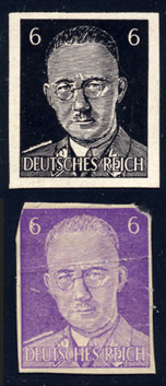 Probedrucke der britischen "Himmler-Propagandafälschung" in Schwarz und Violett des Typs II.